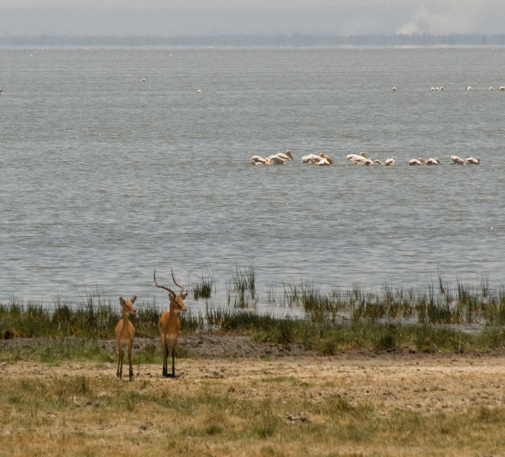 Impalas, Lake Manyara national park, Tanzania.